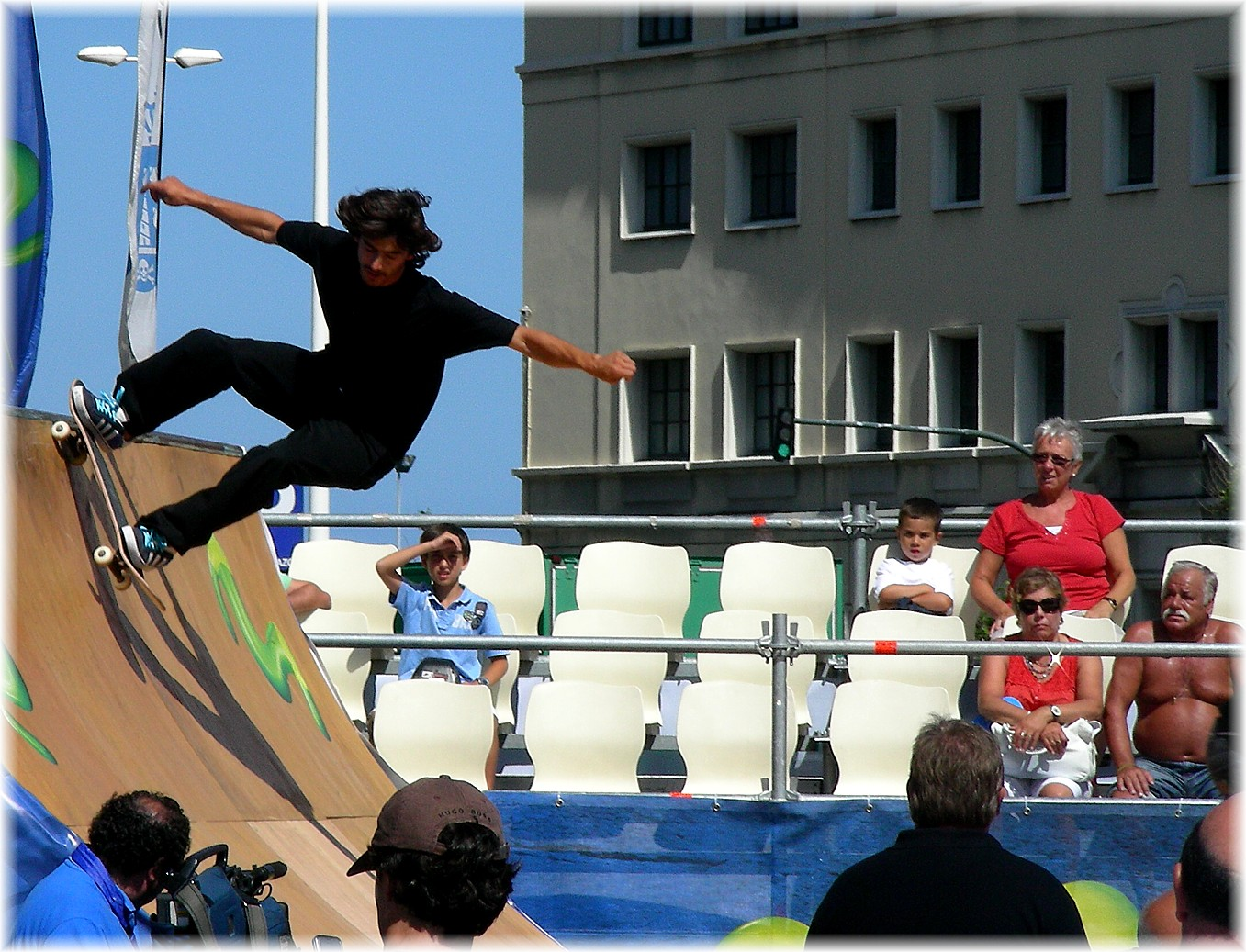 Skate in A Coruña, Galicia (Spain).